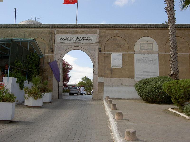 Ancienne entrée de l'hôpital Aziza Othmana, Tunis, Tunisie